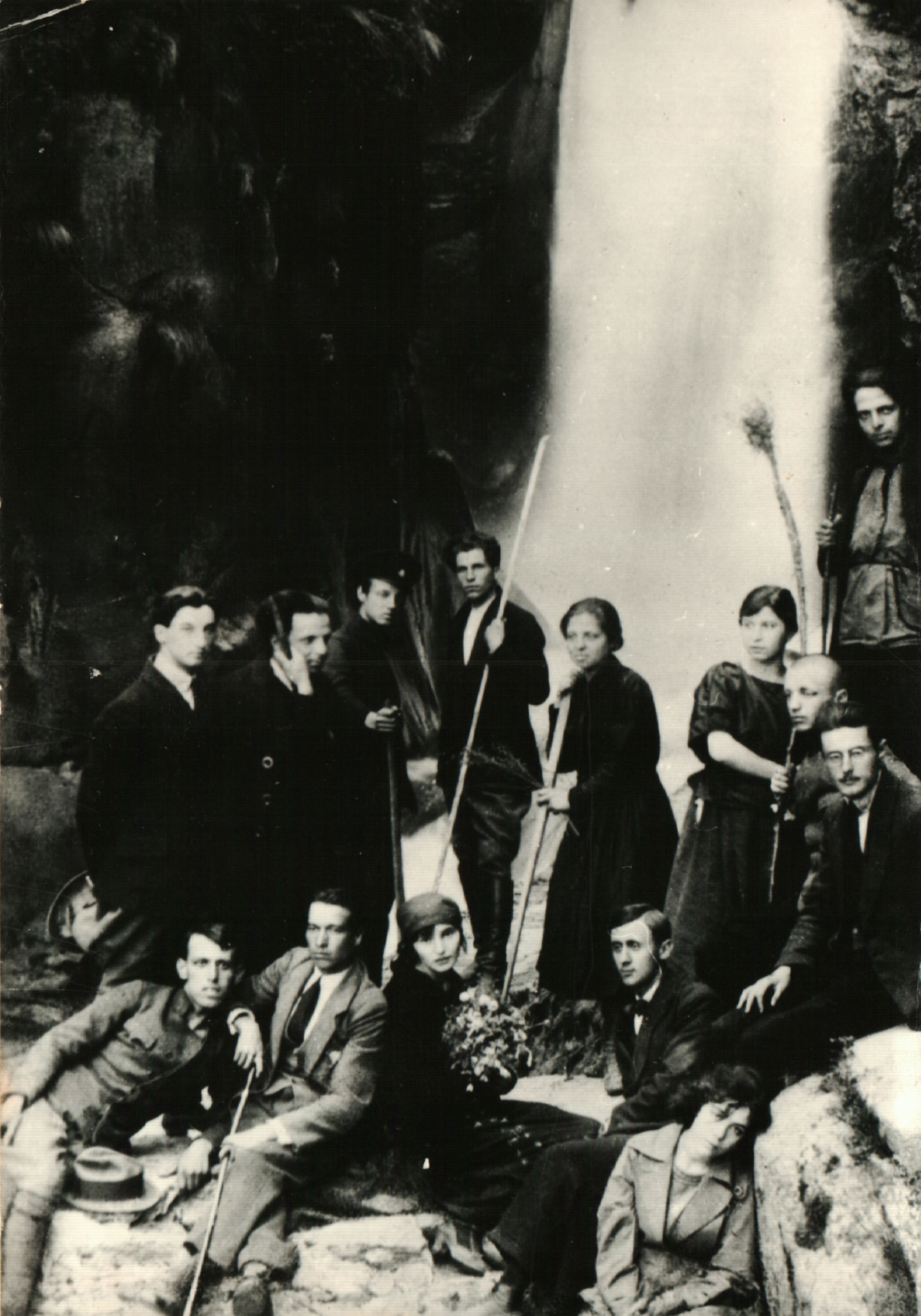 Снимка на Христо Смирненски в Костенец. В десния ъгъл правият е Христо Смирненски. От ляво надясно прави – Веселин Матеев, Матей Матеев, Радослав Габровски, Надежда Измирлиева, Милка Габровска, Радослав Цветков с вечно обръснатата глава и Драгомир Матеев. Седнали – Ламби Цветков, Неделчо Бранев, Радка Матеева, Борис Хаджиилиев и най-отдолу Паша Тодорова.